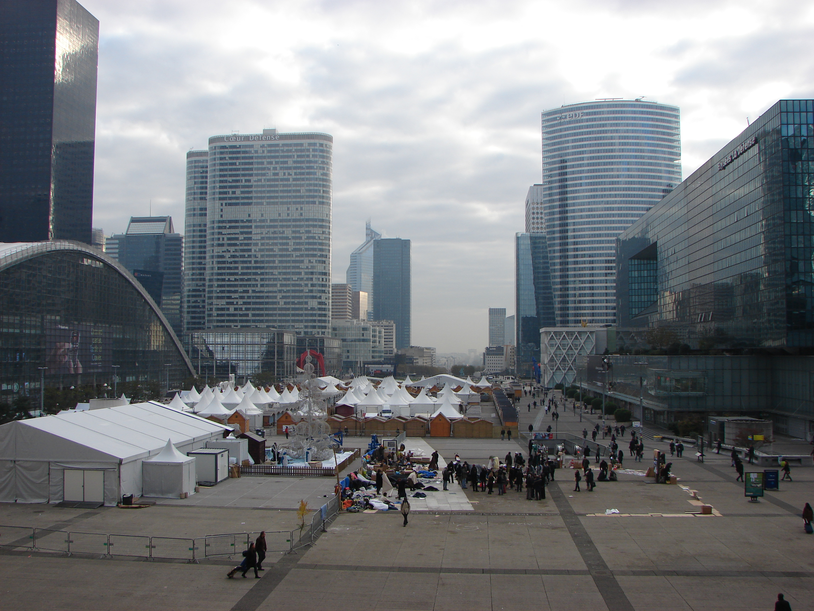 Mouvement des Indignés près du marché de Noël à La Défense